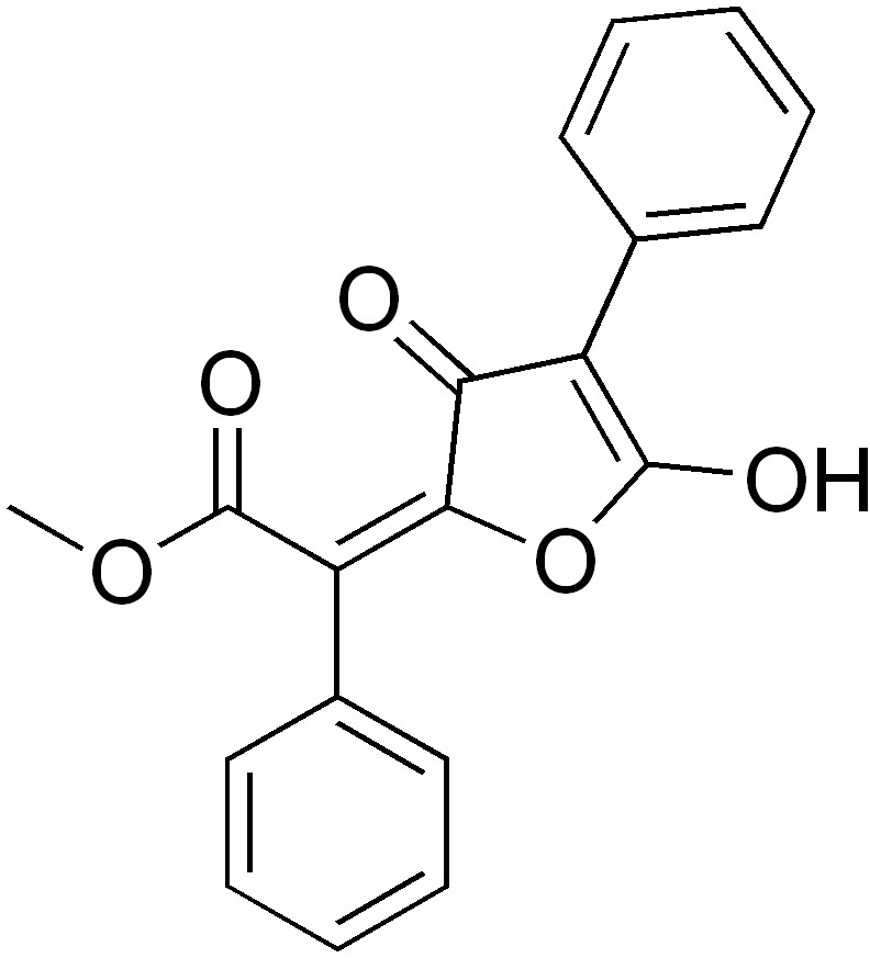 chemical structure of vulpinic acid